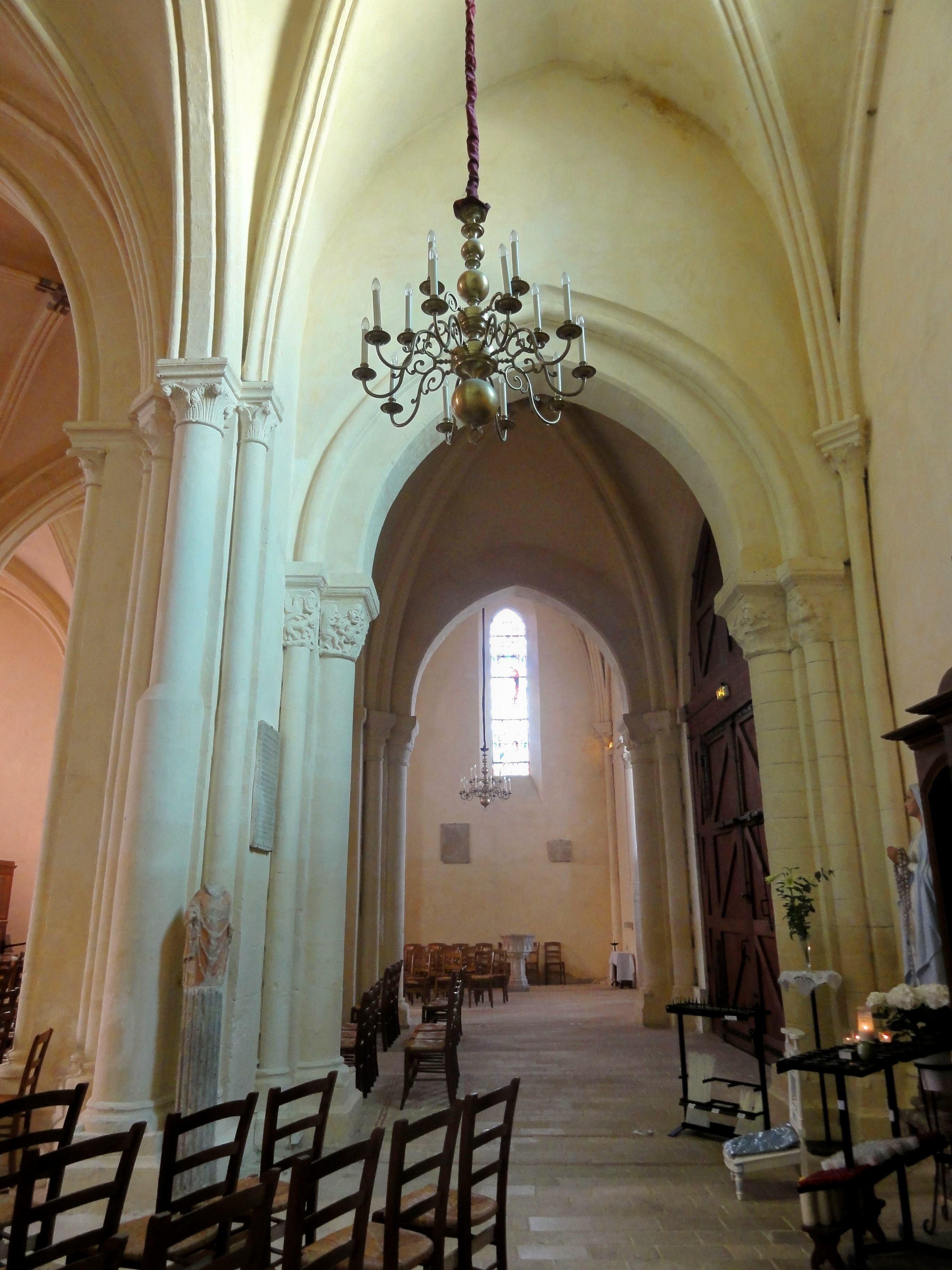 Transept, vue nord-sud.